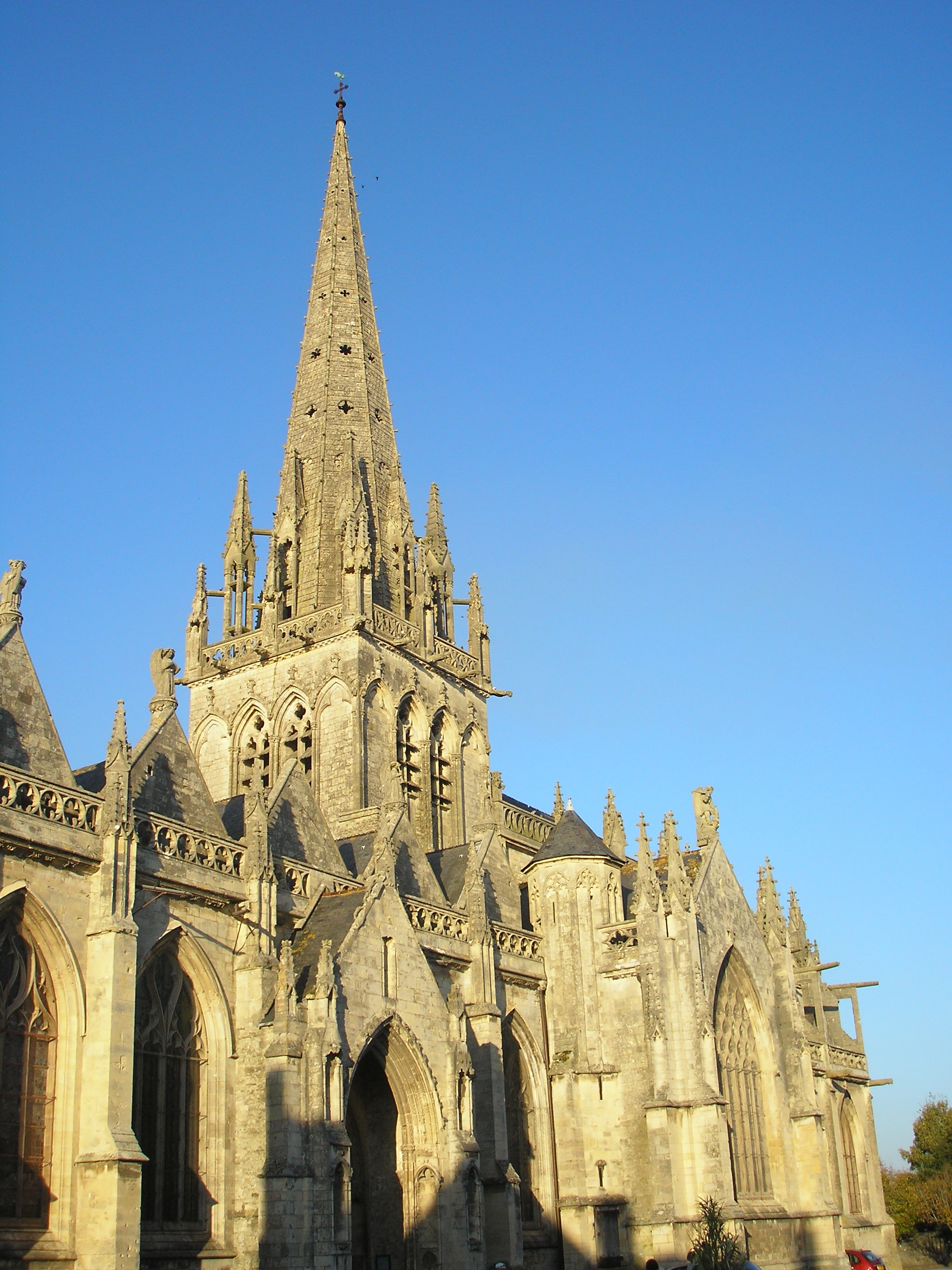 Carentan (Normandie, France). Côté sud de l'église Notre-Dame.